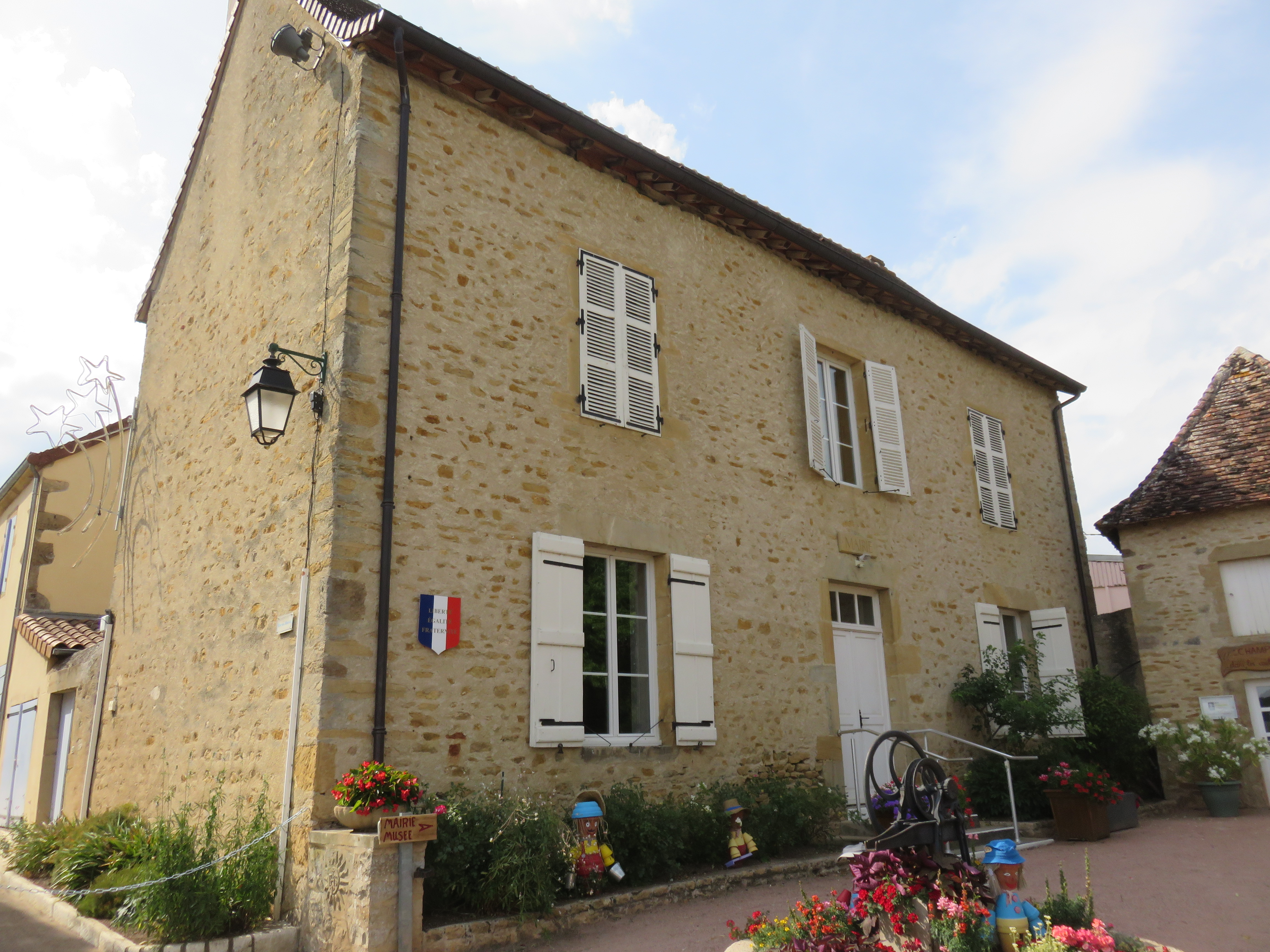 Mairie de Champlecy (Saône-et-Loire, France).